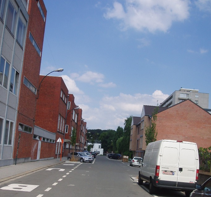 rue Emile Steeno Auderghem Belgium